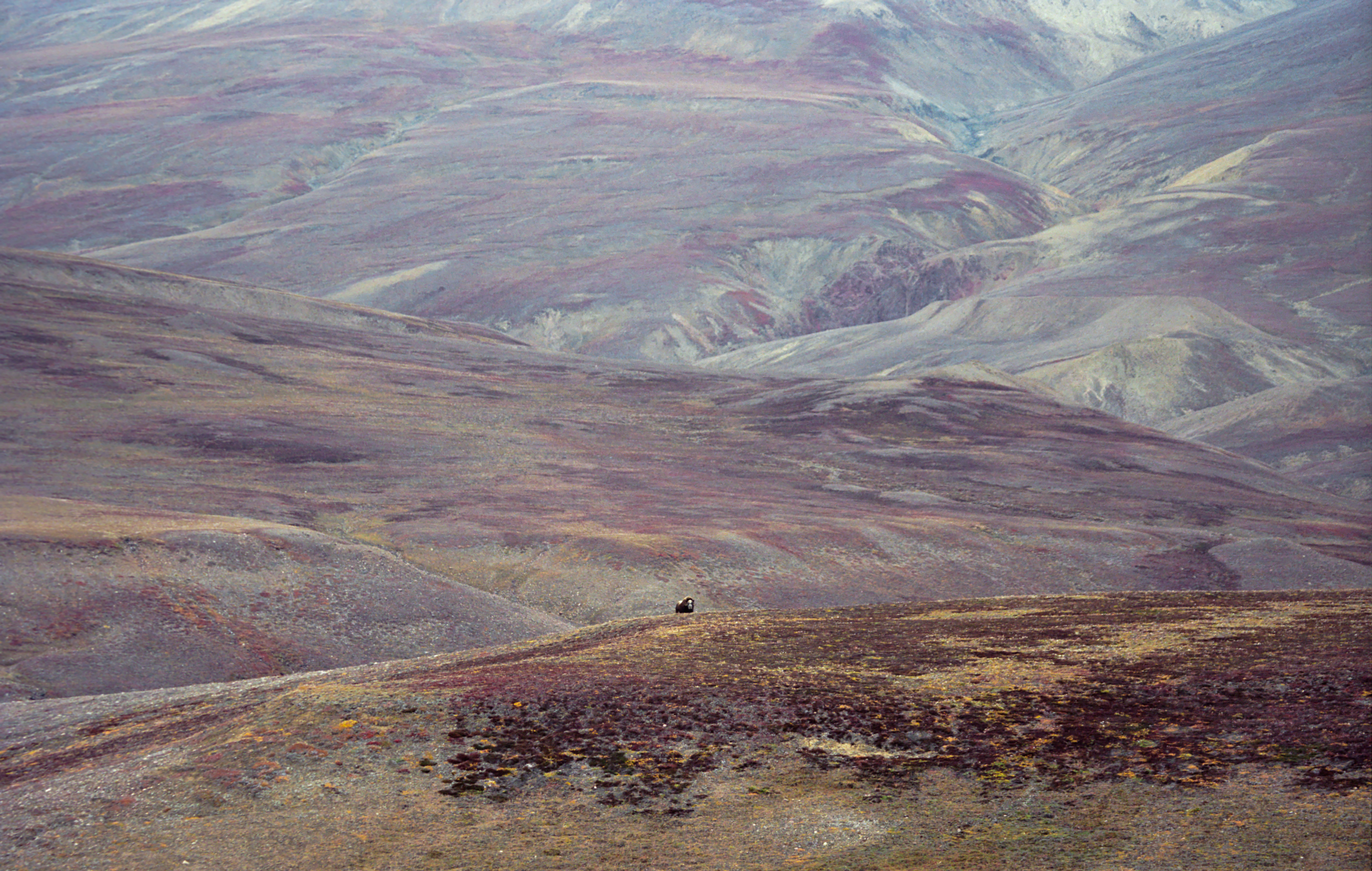 Greenland, musk oxes, tundra